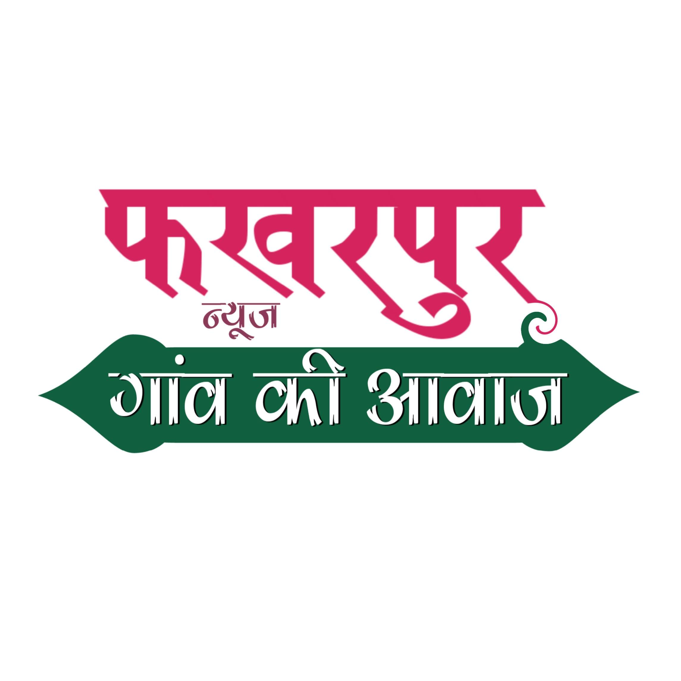 फखरपुर न्यूज़ का लोगो है